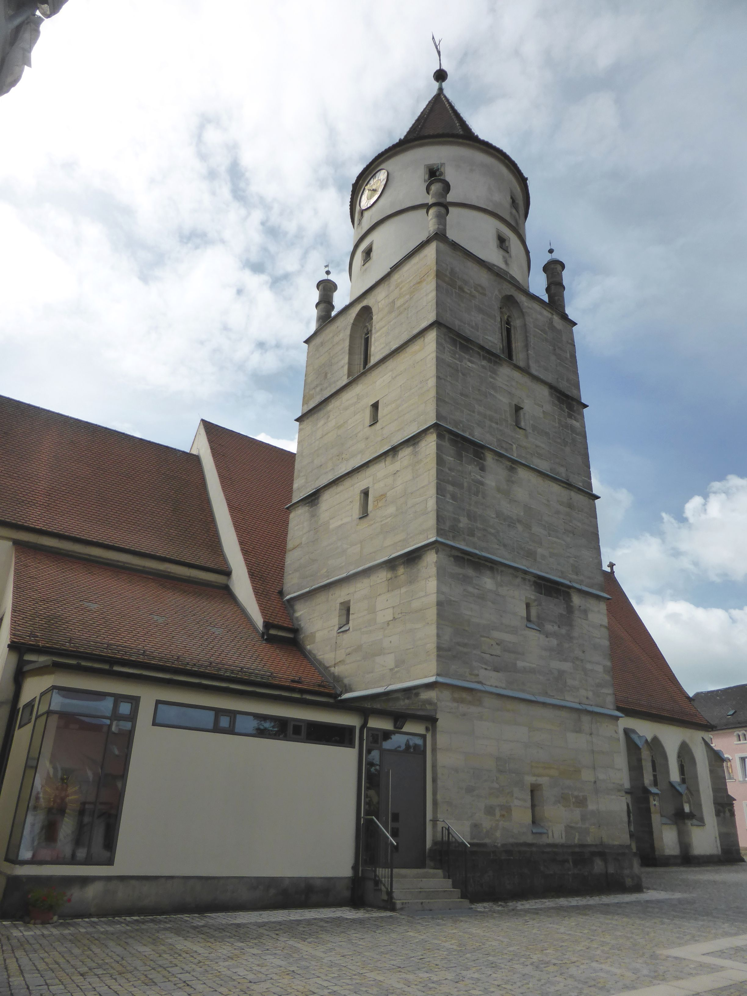 St. Laurentius (Eschenbach in der Oberpfalz)